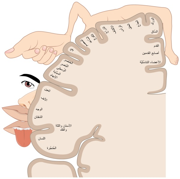 رسمُ الأُنيسان: قشرة الدماغ الحسيَّة.